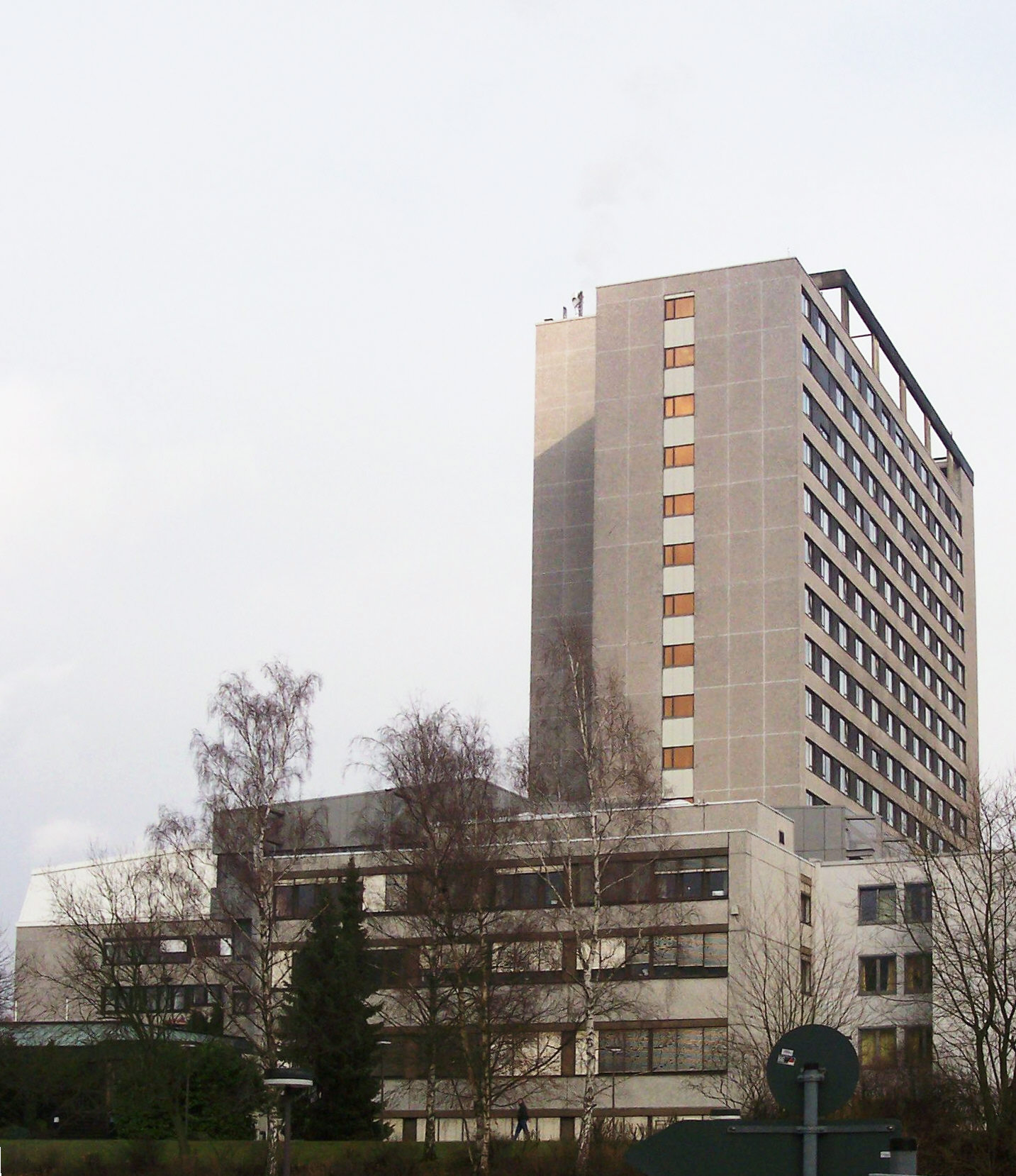 Bochum Knappschaftskrankenhaus Langendreer Universitätsklinik